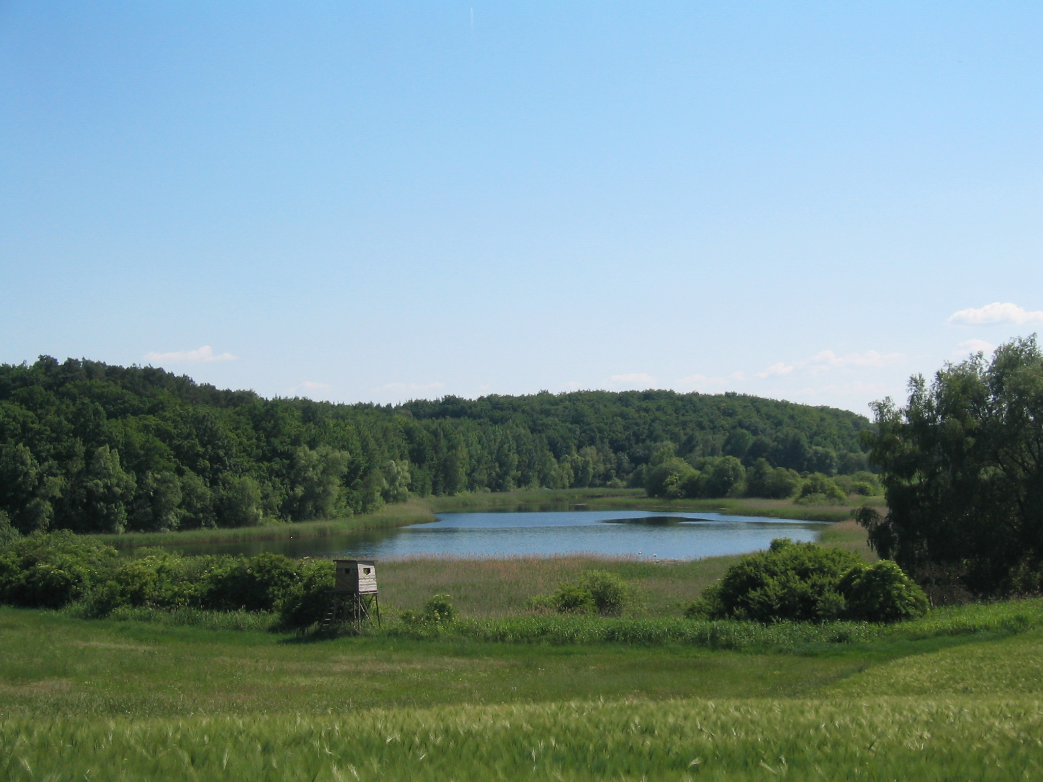 Dolgensee in der Uckermark nördlich von Melzow.